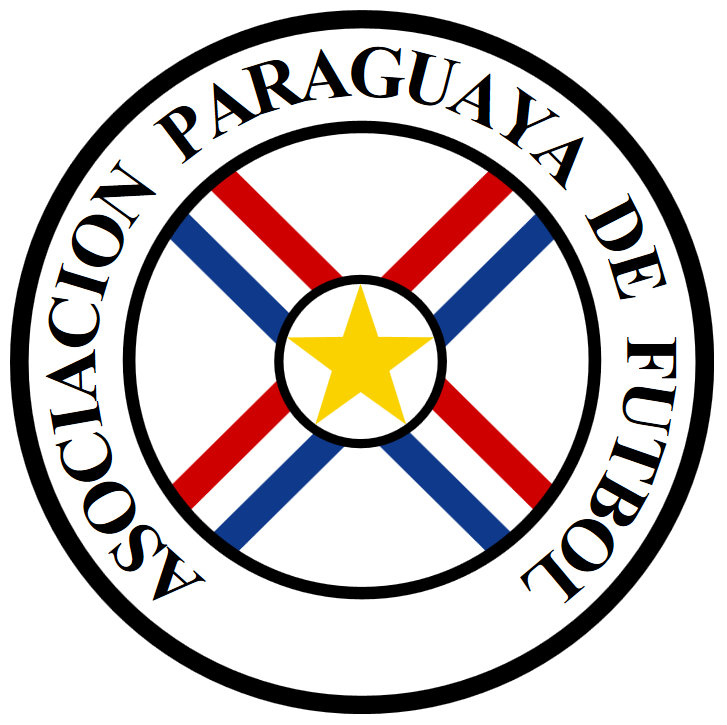 Logo de la Asociación Paraguaya de Fútbol y de su seleccionado nacional.